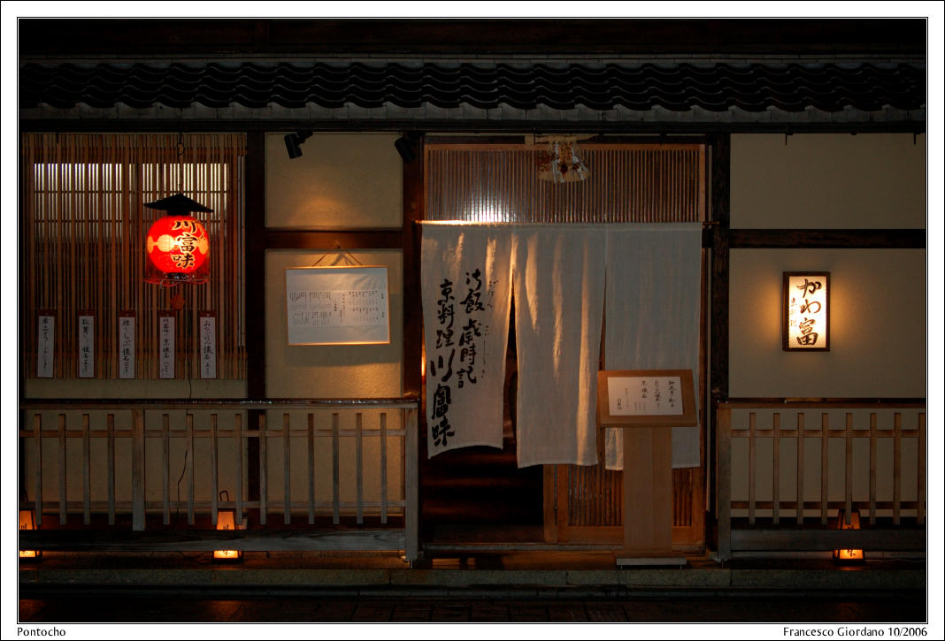 Ristorante a Gion / Gion restaurantKyoto - Gion